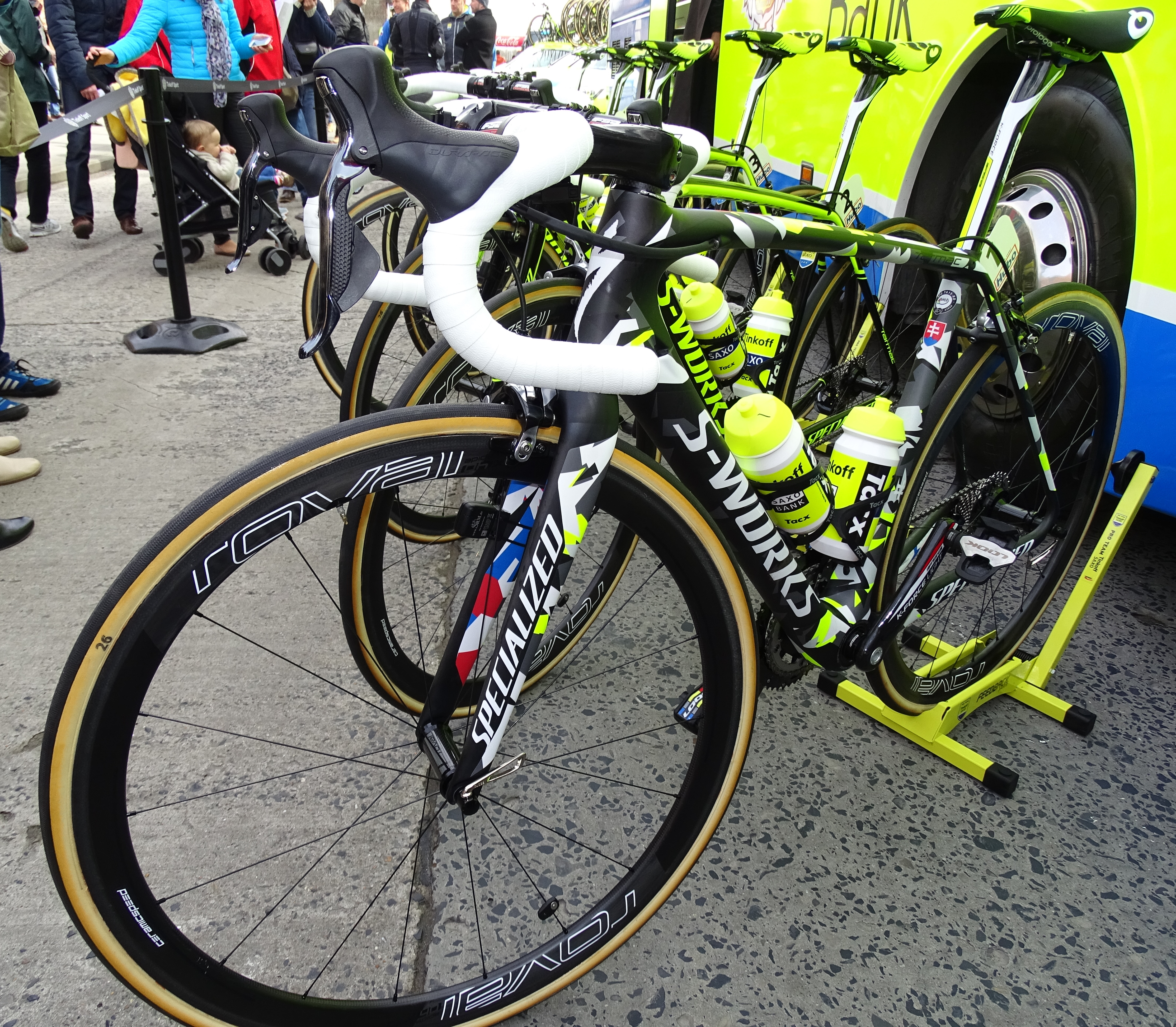 Reportage réalisé le vendredi 27 mars à l'occasion du départ et de l'arrivée du Grand Prix E3 2015 à Harelbeke, Belgique.